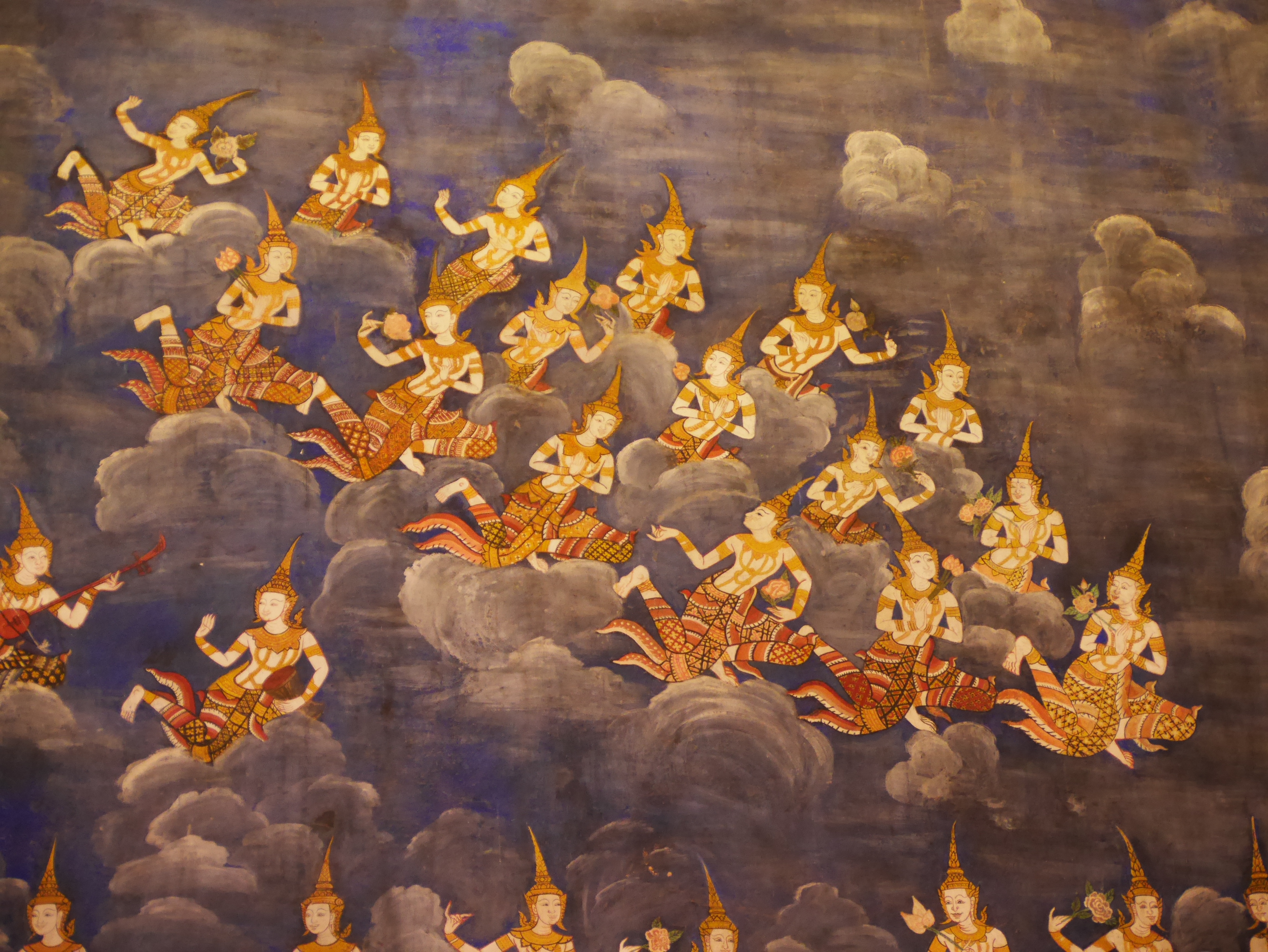 วัดเทวราชกุญชร